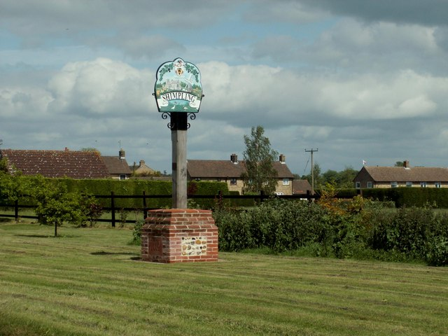 Shimpling village sign, Suffolk